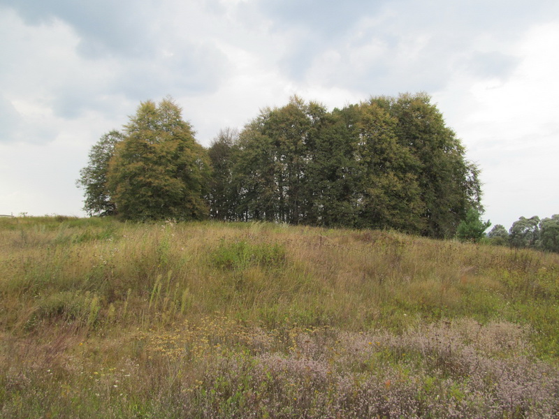 Гайшын. Яўрэйскія могілкі